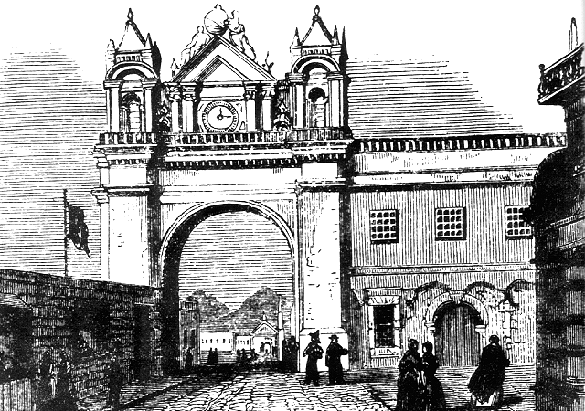 La antigua portada de Lima, según un grabado de comienzos del siglo XIX. Esta portada fue incendiada por el agente chileno Cornelio Granados el 10 de abril de 1879 cinco días después de que Chile declarara la guerra al Perú. A la izquierda se ve parte de la Iglesia de los Desamparados.